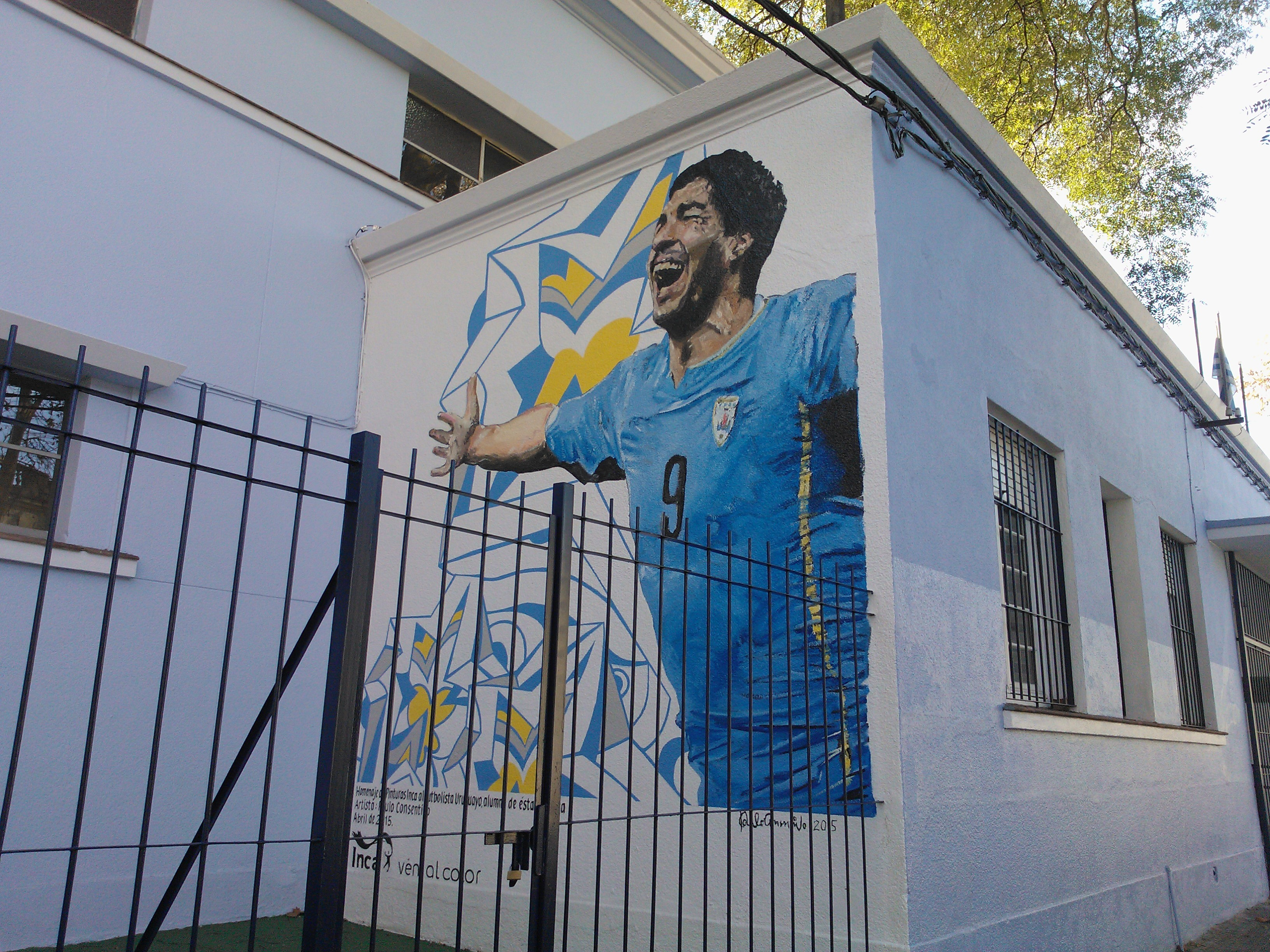 Mural en la escuela 171 del barrio La Comercial, pintado por INCA en abril de 2015 como homenaje a uno de sus alumnos más destacados a nivel mundial, el goleador histórico de la Selección Uruguaya de Fútbol Luis Suárez.